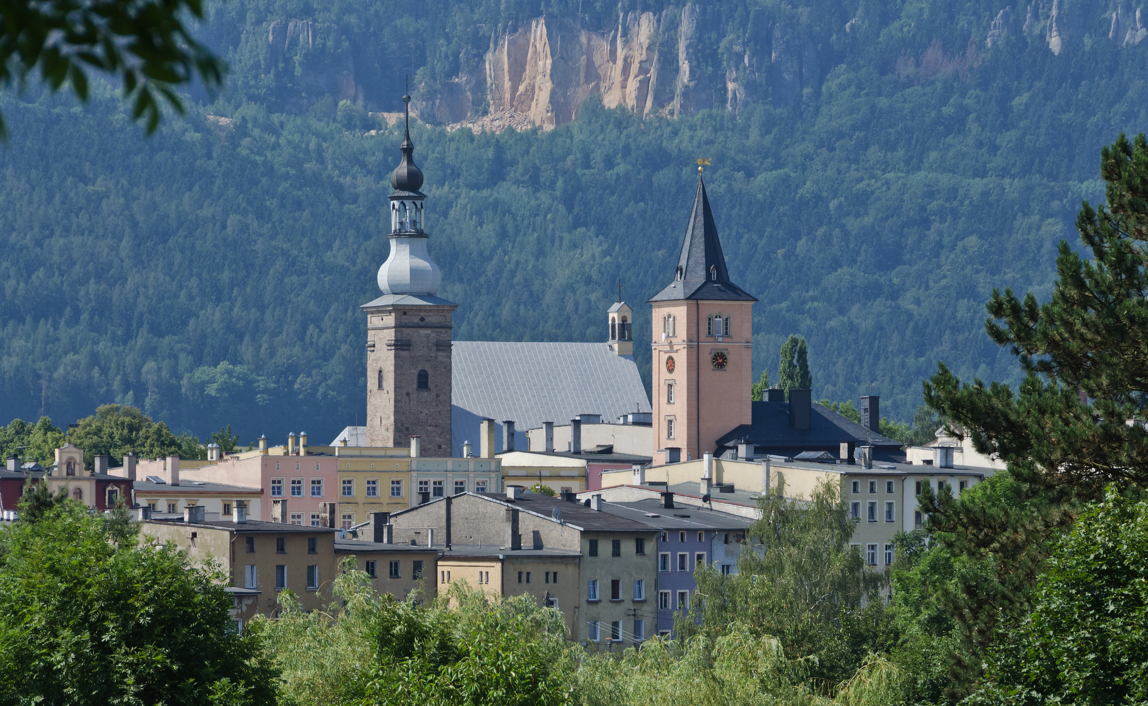 Radków, miasto